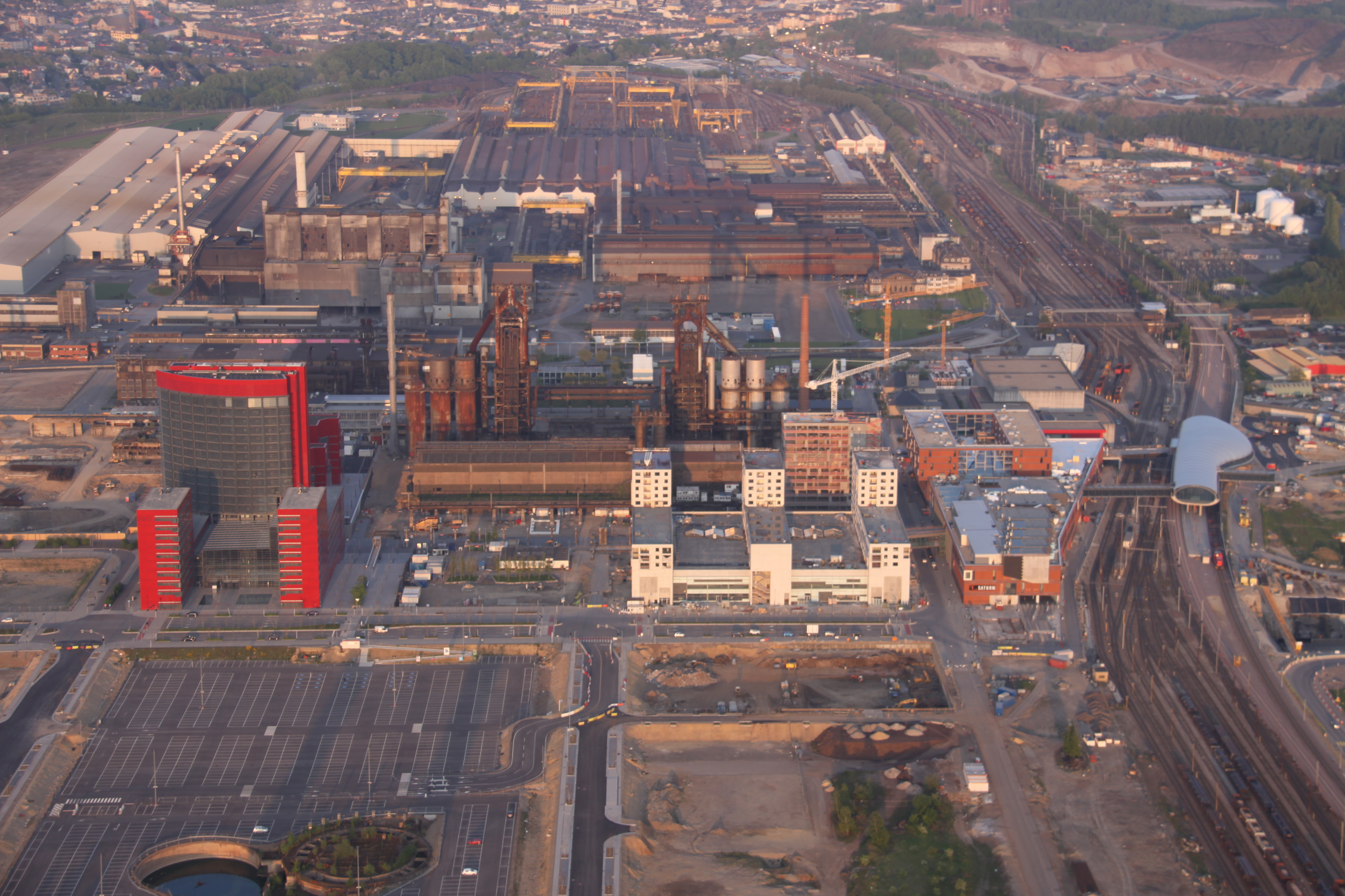 Esch-Belval (Luxembourg) vu des airs